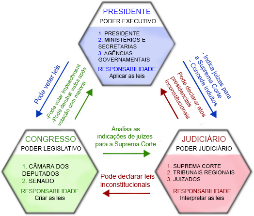 Esquema simplificado mostrando algumas atribuições e instituições básicas em um sistema de separação de poderes. A imagem não representa nenhum sistema governamental existente e é apenas um exemplo de como geralmente acontece, existindo inúmeras variações em diferentes nações.